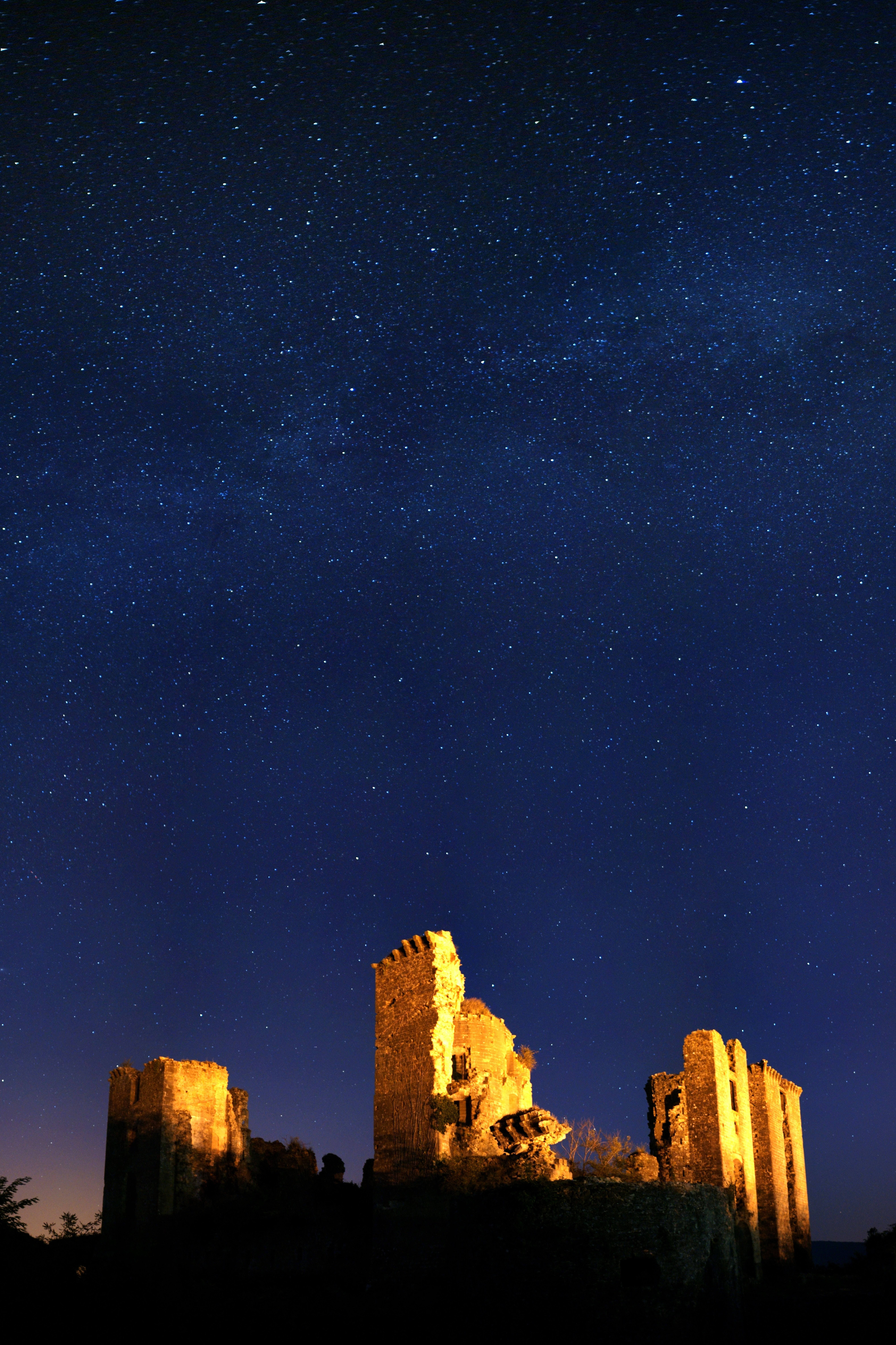 Ce chateau est aujourd'hui laissé à l'abandon et a fait l'objet de nombreux pillages ces dernières décennies. Ses ruines en font un excellent sujet photographique!